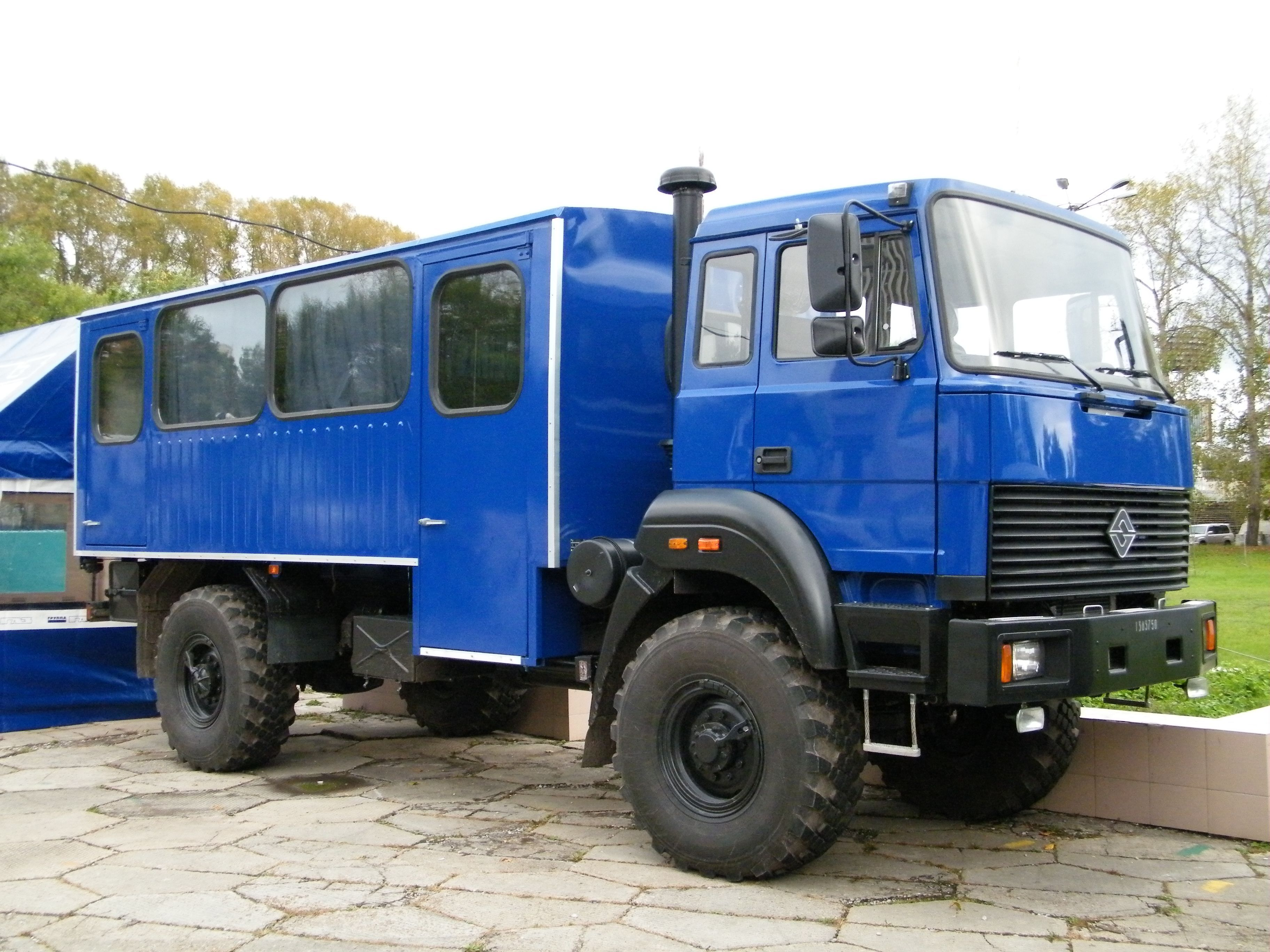 Вахтовый автобус Урал-32552-3013-59